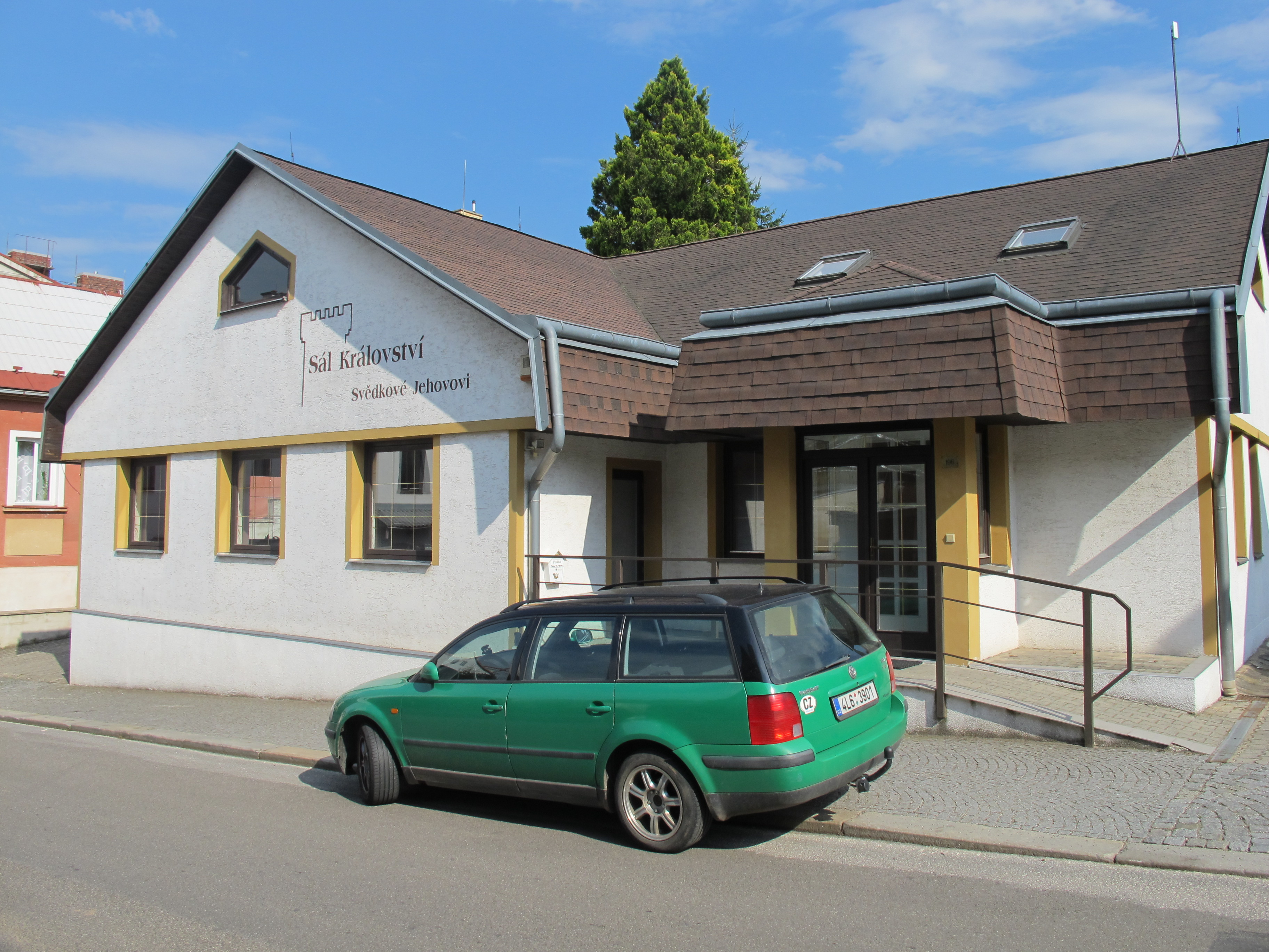 Lomnice n. Popelkou - jehovisté, Antala Staška čp. 196